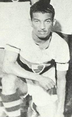 Tomás Soares da Silva, mais conhecido como Zizinho (São Gonçalo, 14 de setembro de 1921 — Niterói, 8 de fevereiro de 2002), foi um treinador e ex-futebolista brasileiro. Jogou como atacante para a Seleção Brasileira. Na época da foto (1944) jogava no C.R. Flamengo (Rio de Janeiro, RJ, Brasil)